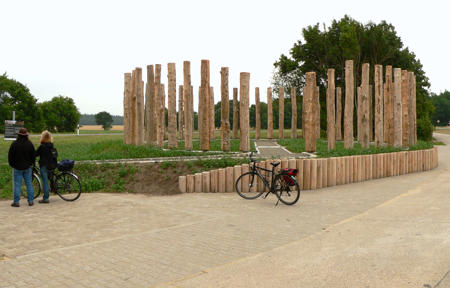 Woodhenge Kreis bei Pevestorf